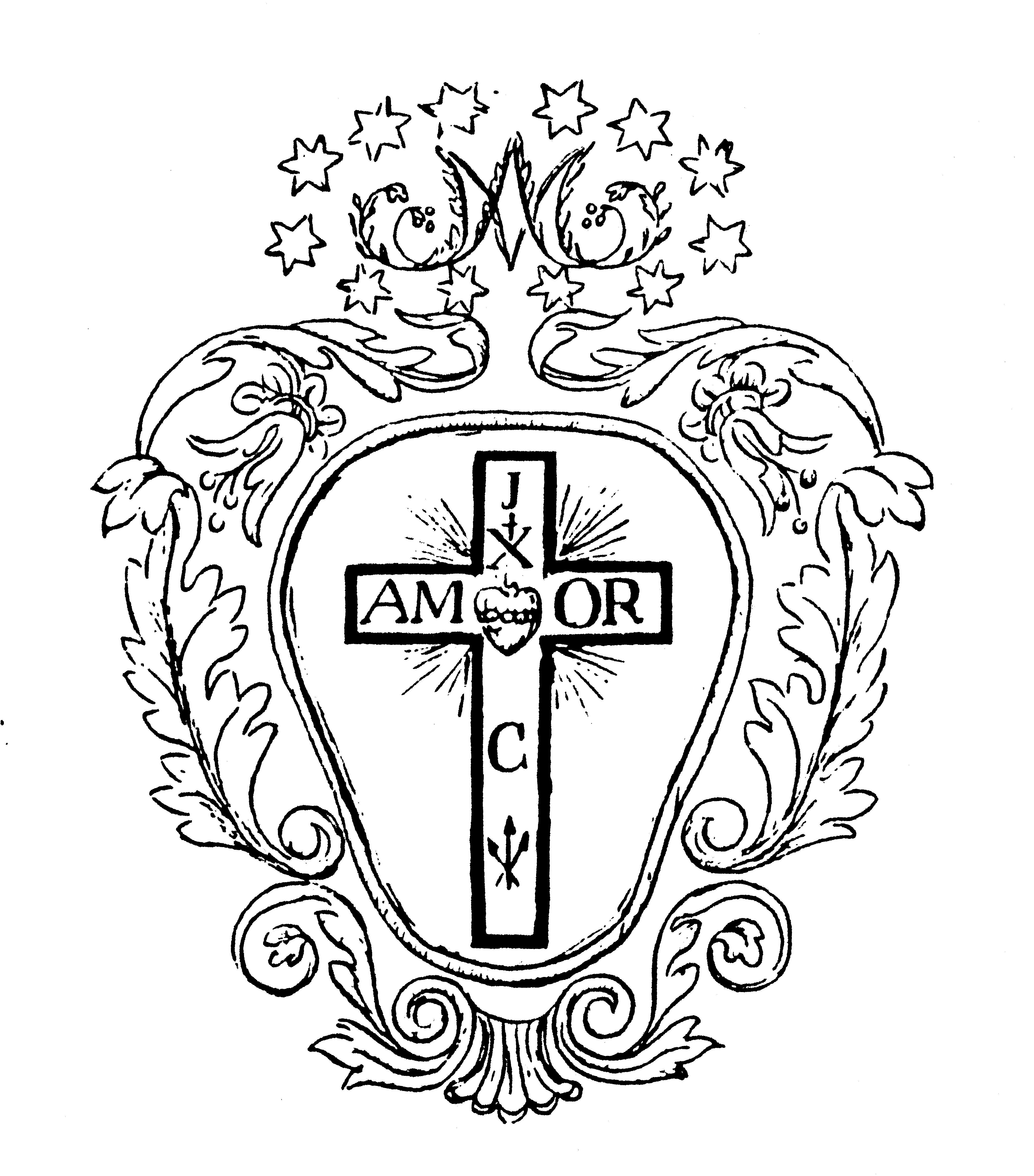 Stemma realizzato dal fondatore per le Figlie del Crocifisso di Livorno